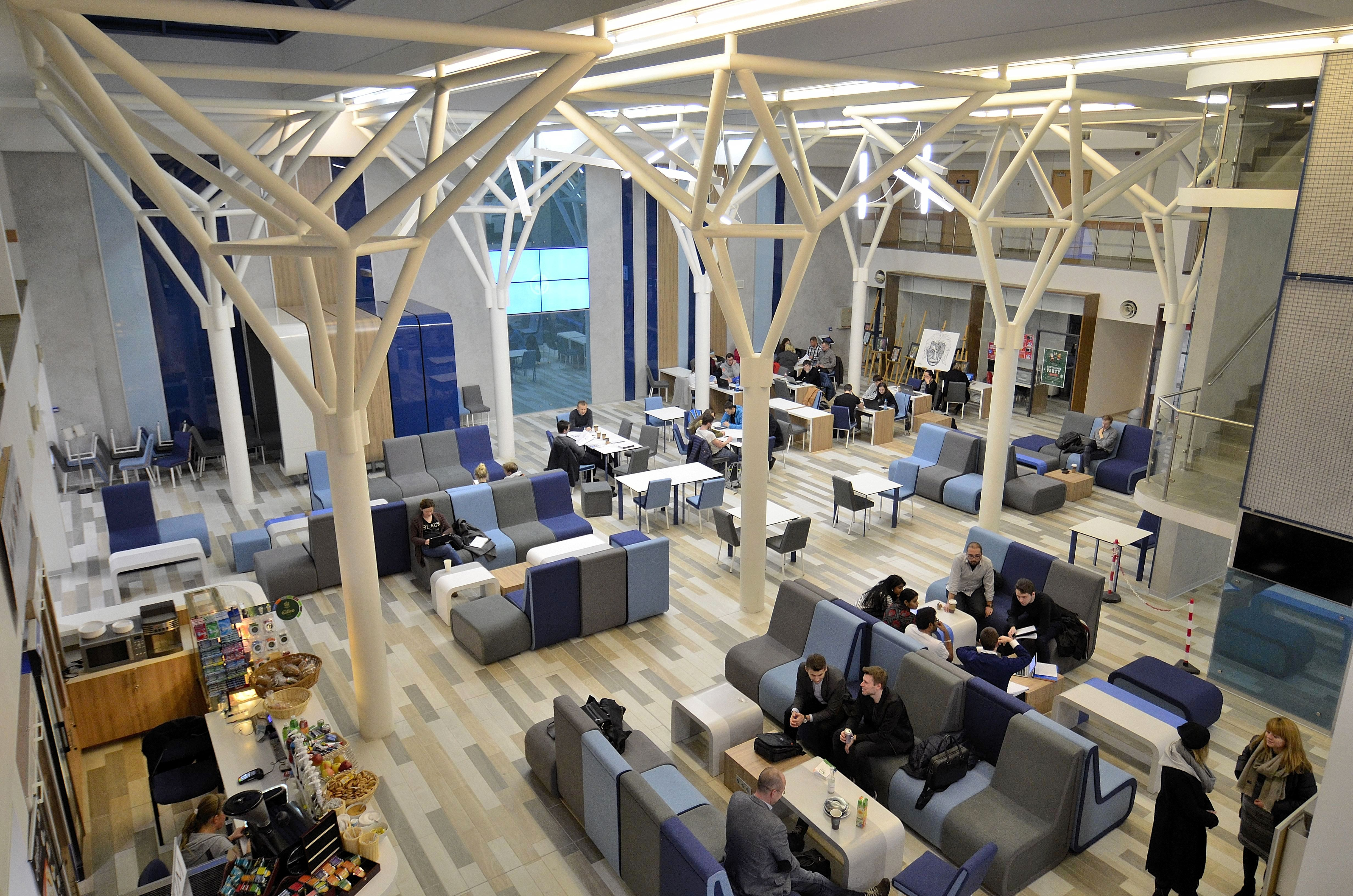 Atrium w budynku D Akademii Leona Koźmińskiego